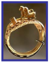 Cu-Au sistema